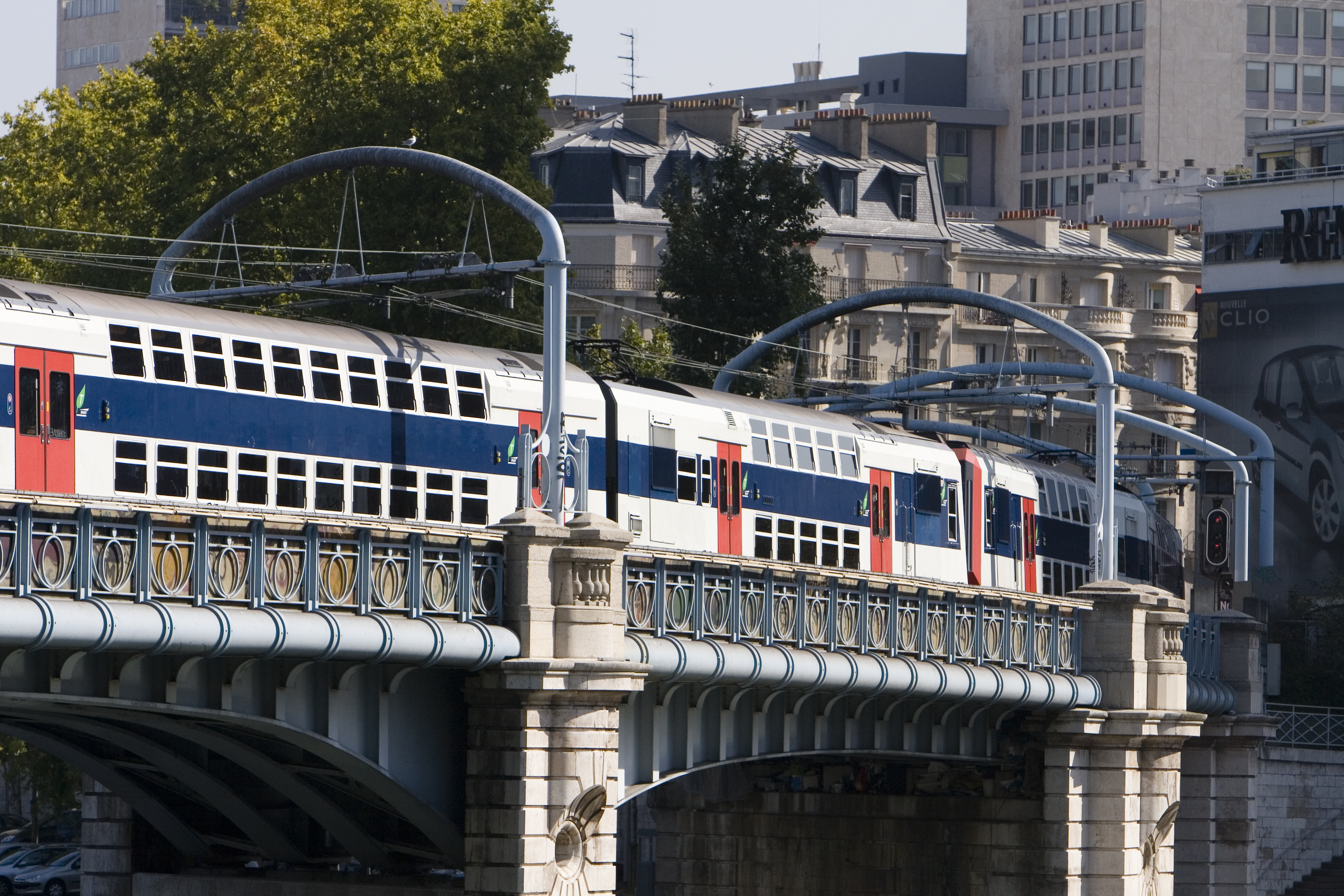 RER C sur le pont Rouelle, Paris, France.